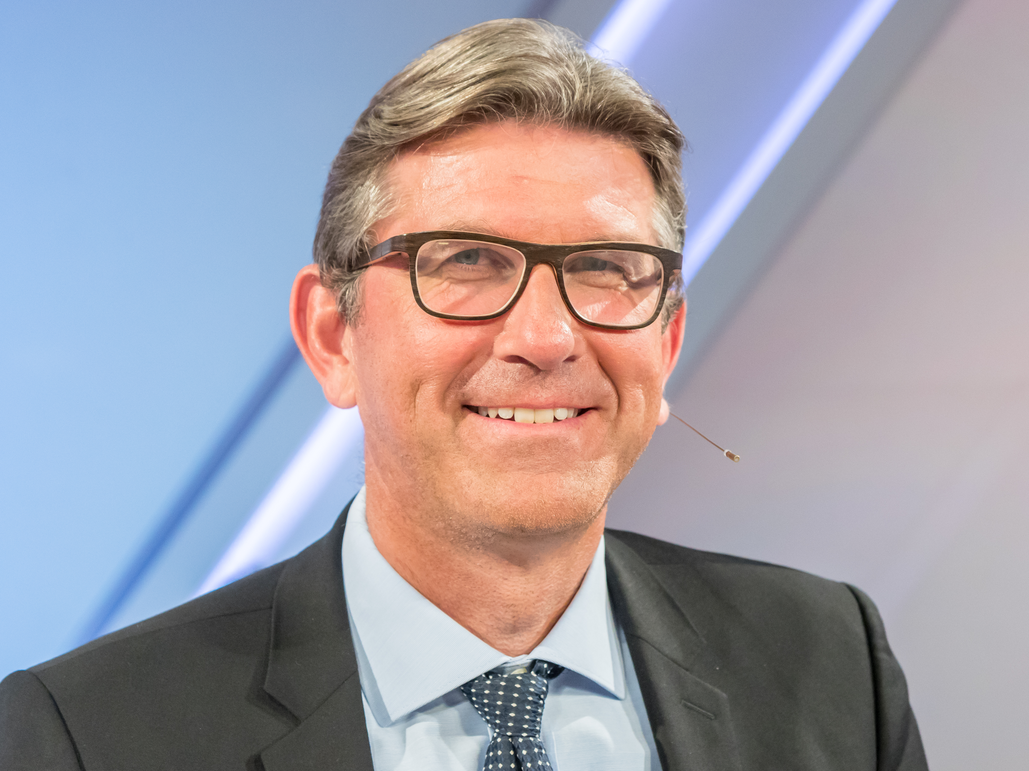 MAISCHBERGER am 14. August 2019 in Köln. Produziert vom WDR. Sommerstaffel „maischberger. die woche“ Foto: Wolfram Weimer, Publizist und Verleger